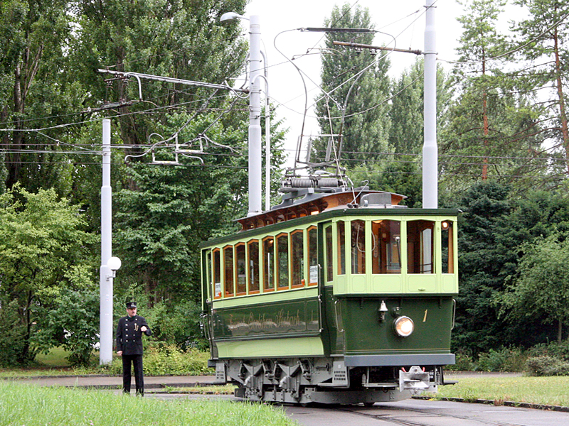 Historischer Tram-Triebwagen Ce 2/2 der Gesellschaft Zürich-Oerlikon-Seebach (ZOS) aus dem Jahre 1897 (Tram-Museum Zürich)